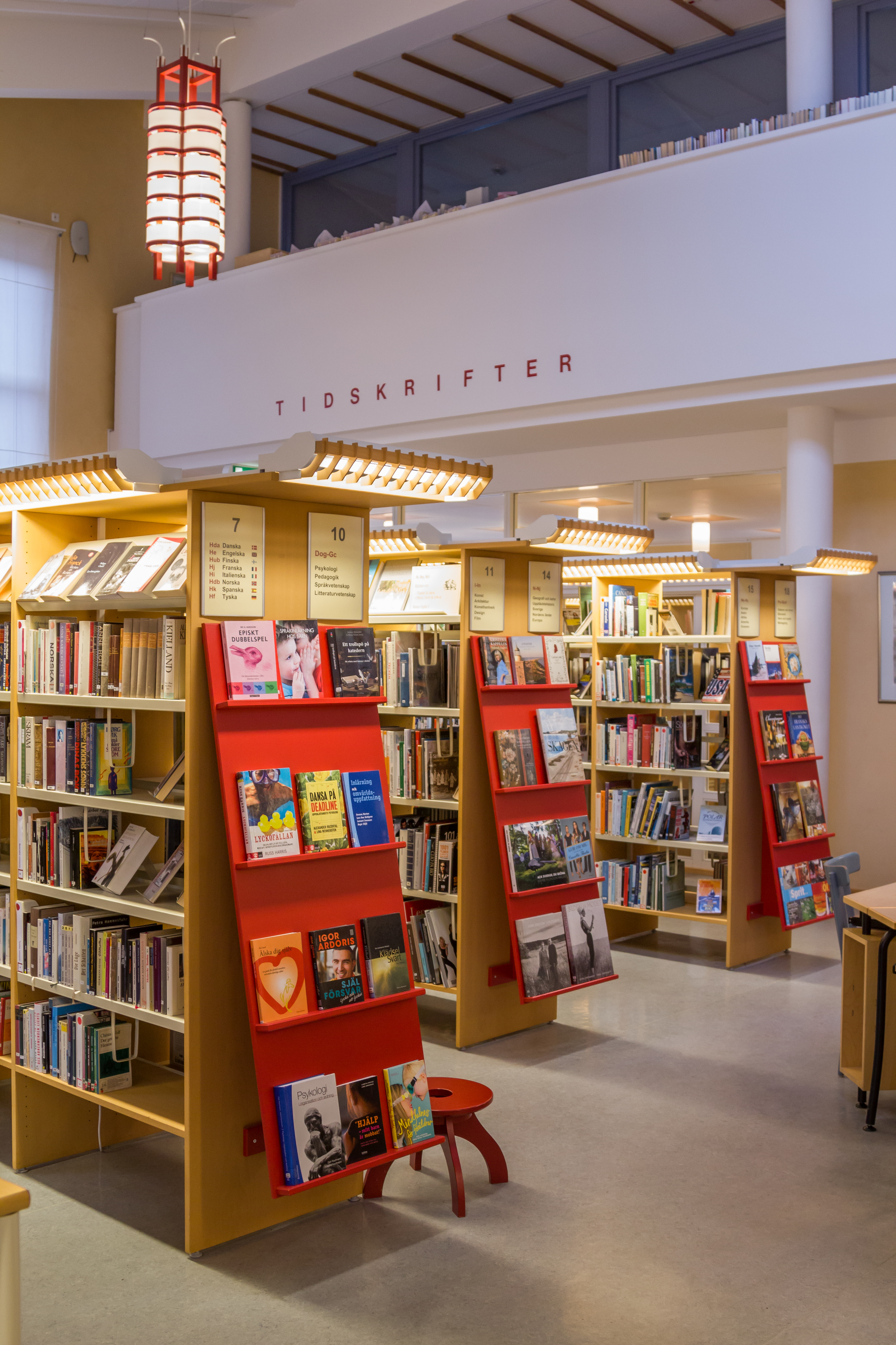 Hedemora stadsbibliotek, Hedemora, Dalarnas län, Sverige